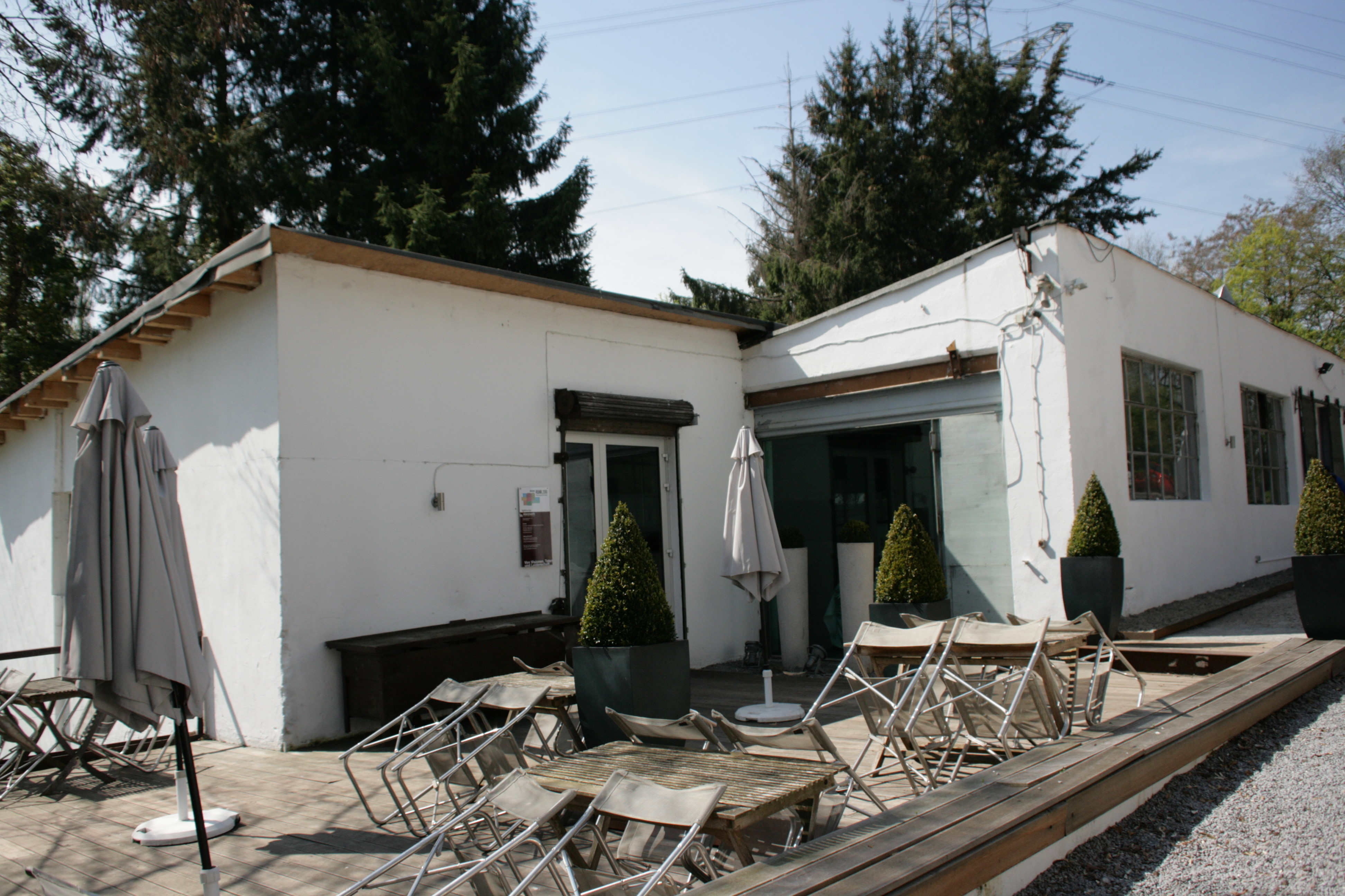 Stanzwerk, Obernbaakstr. 127 in Bochum